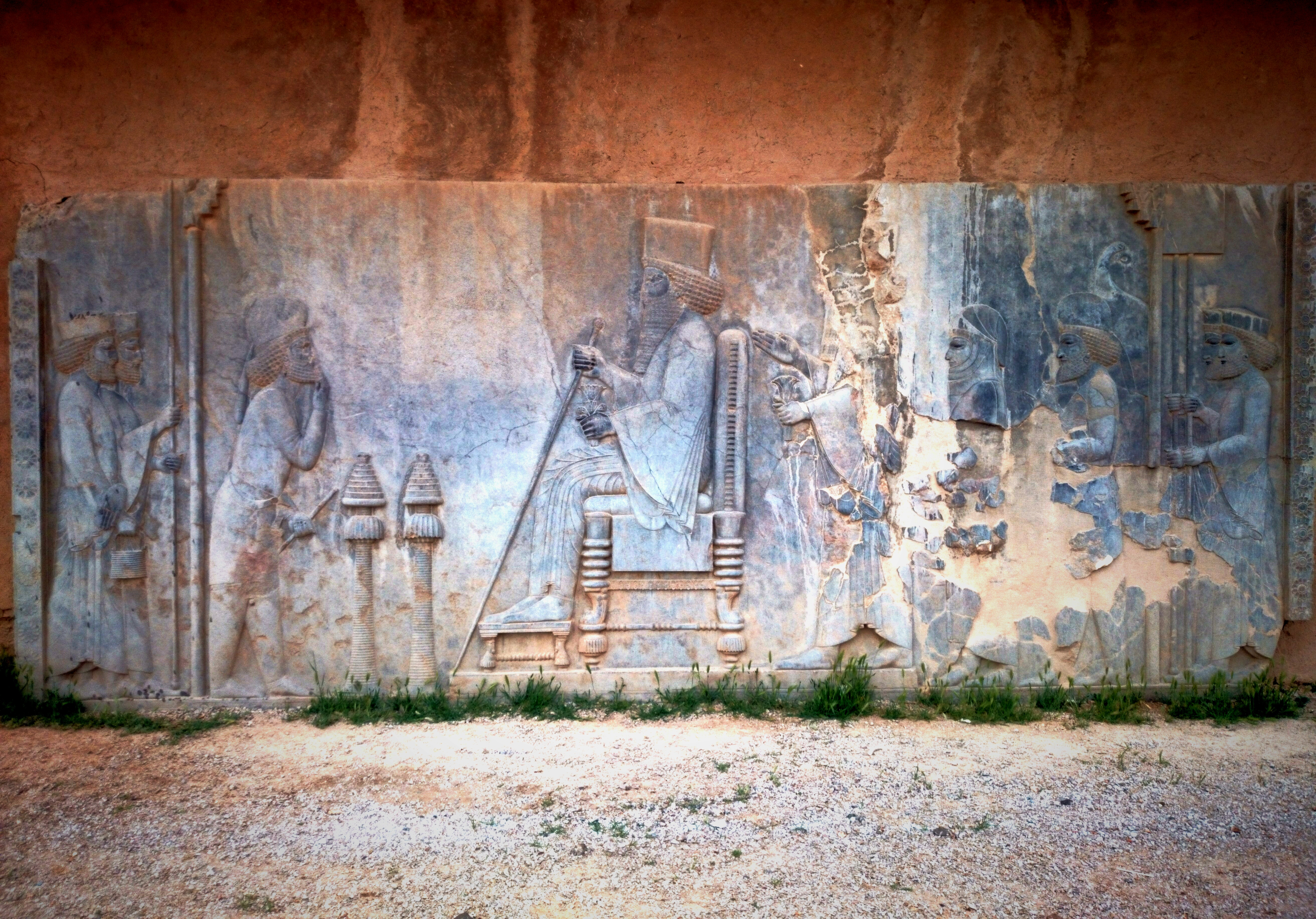 مجلس بارعام خشایار شاه